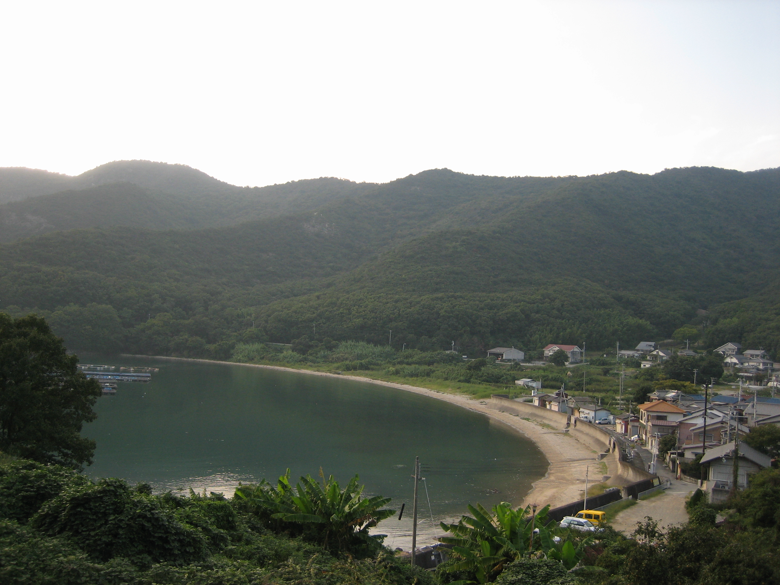 兵庫県たつの市御津町大浦。国道250号線より撮影。